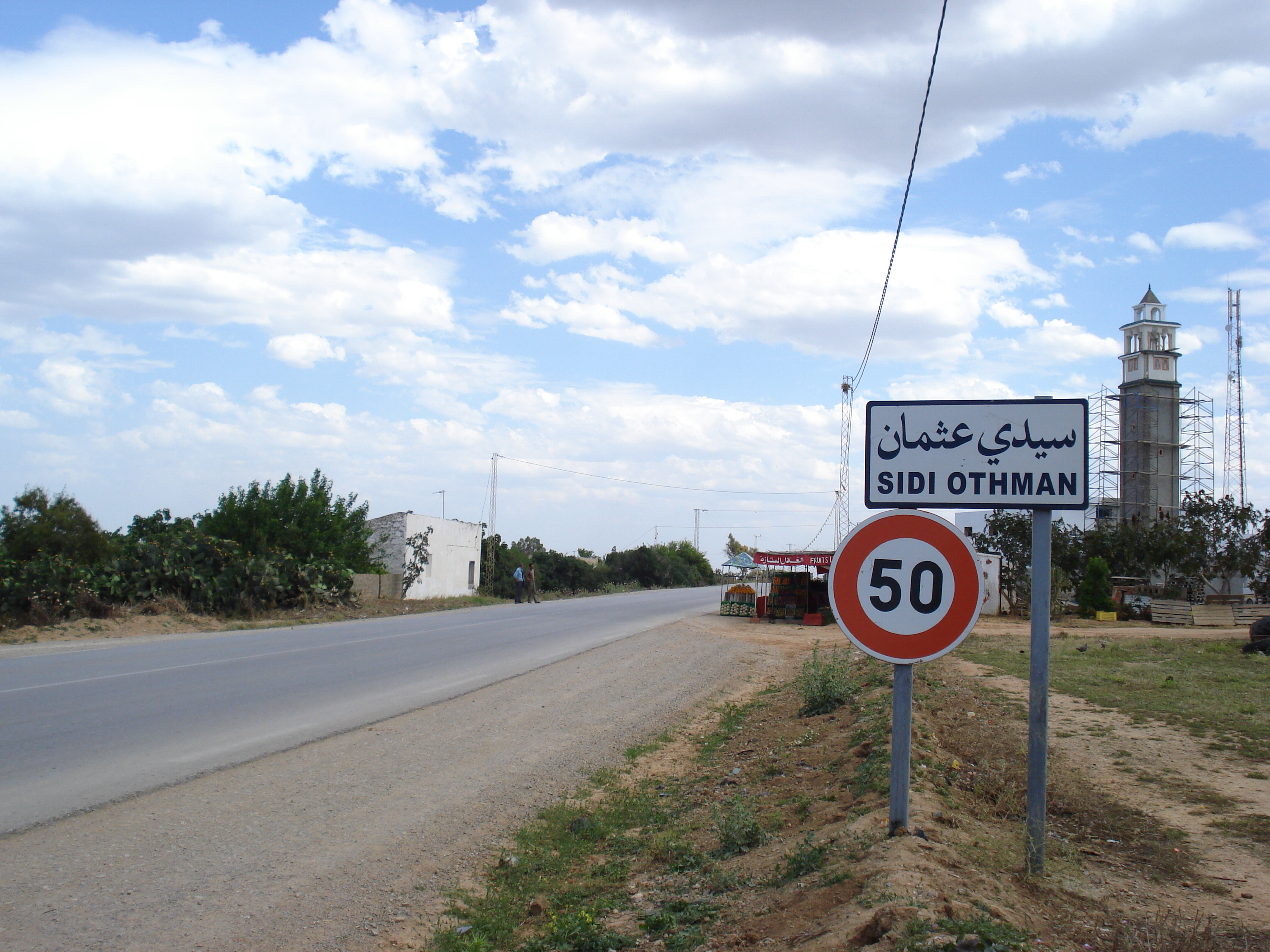 Sidi Othman village, Tunisia